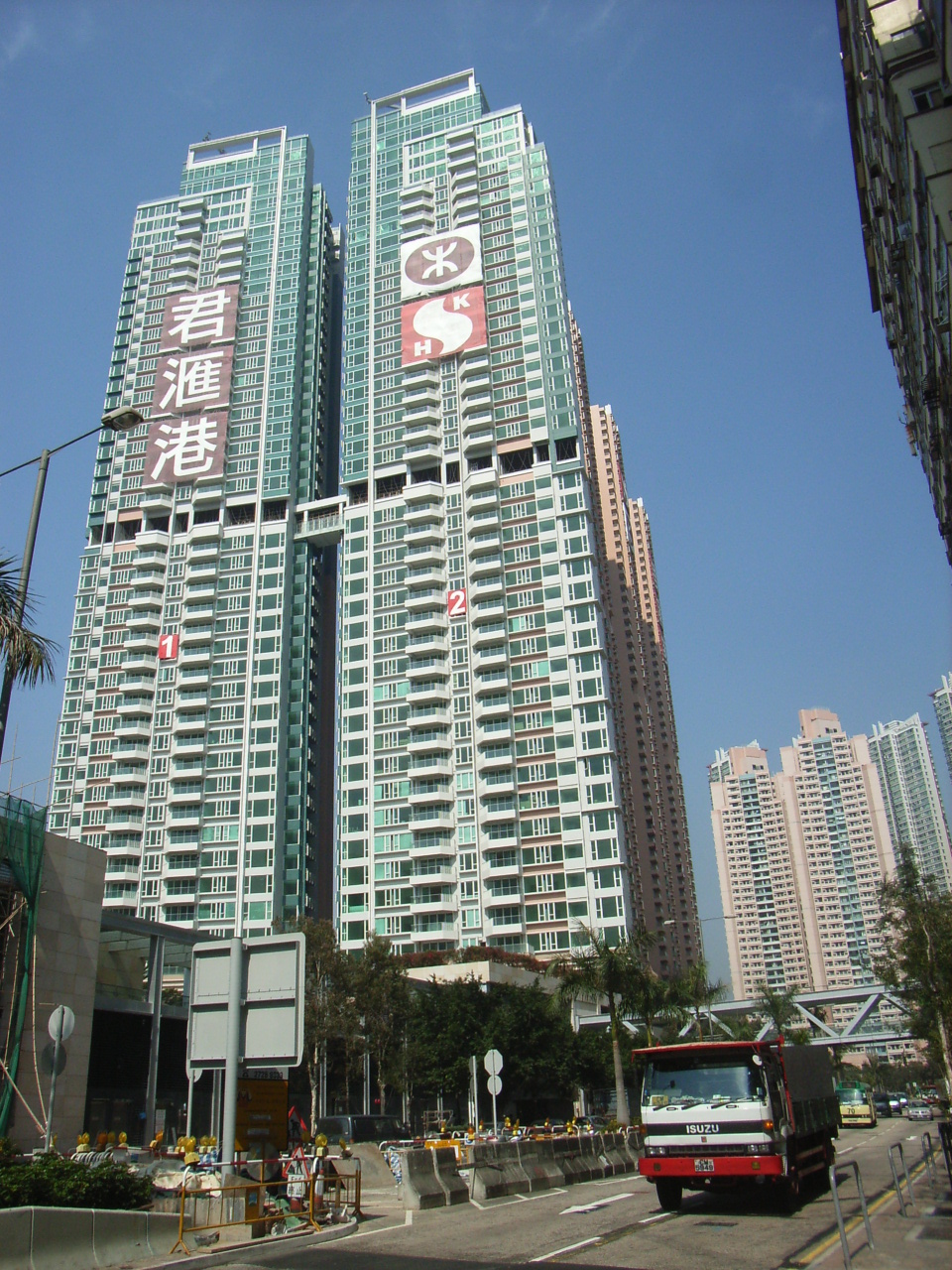 深旺道是香港的一條道路，位於西九龍填海區。君匯港樓花於2007年落成。